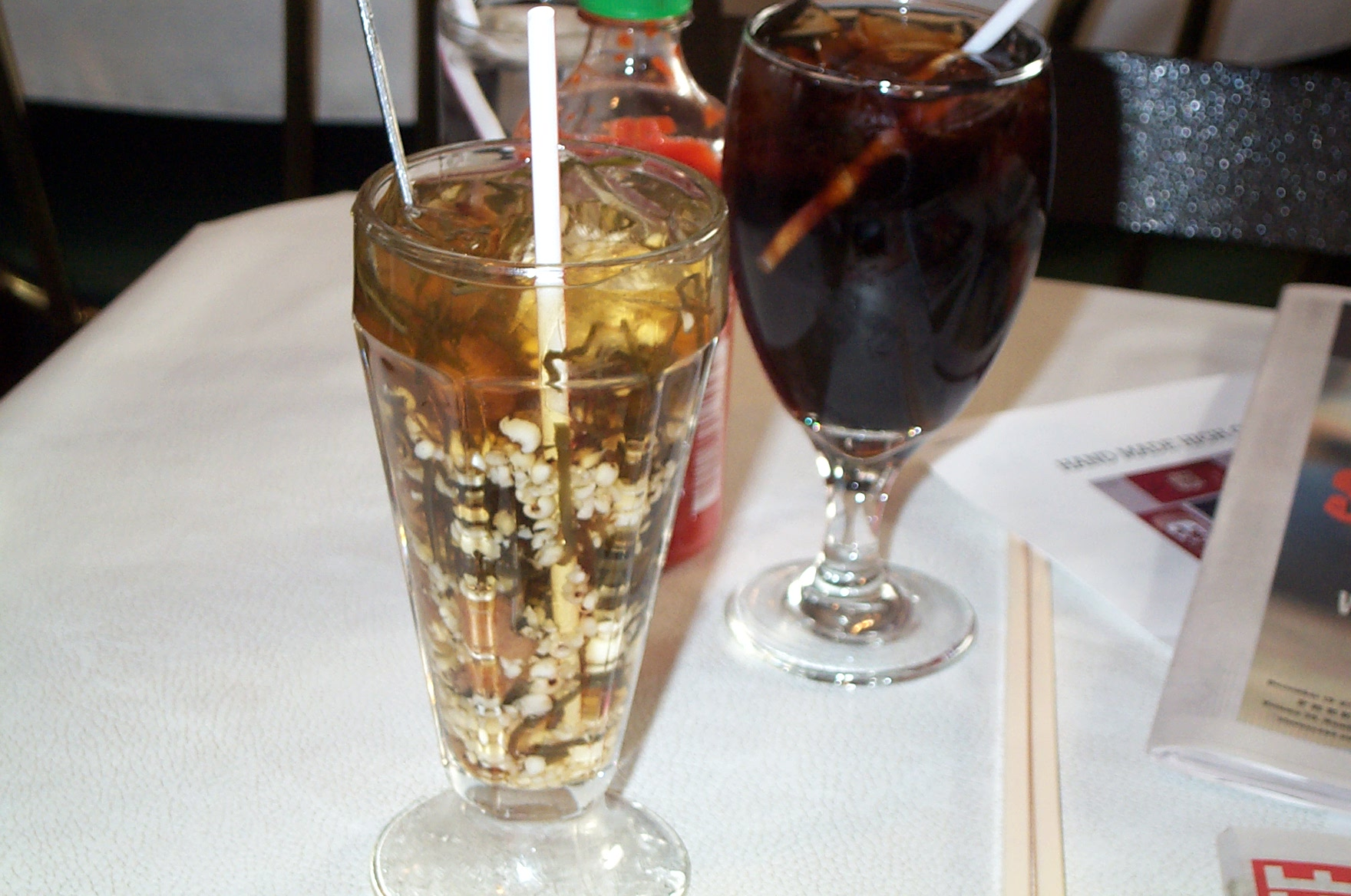 A glass of sâm bổ lượng.